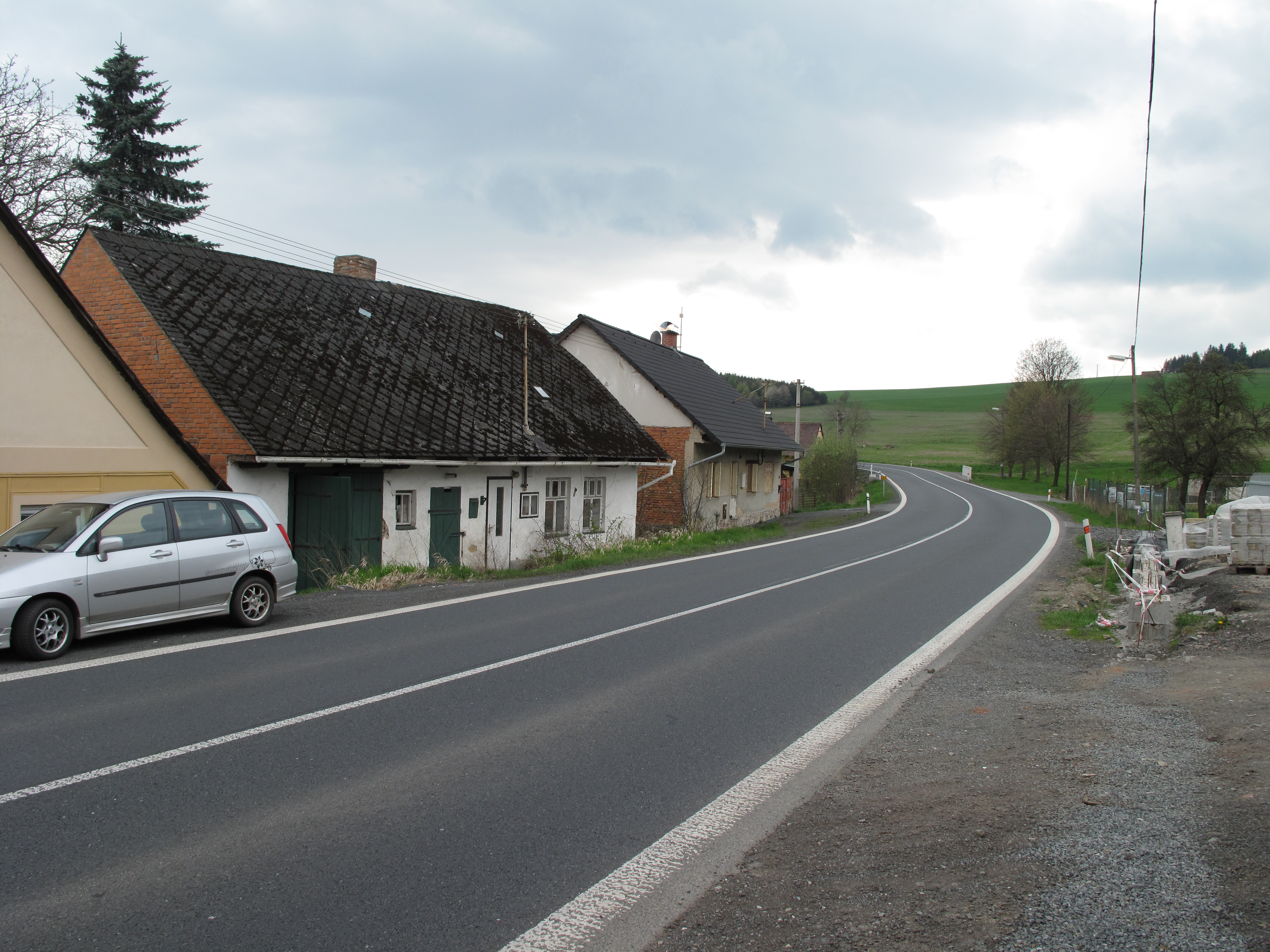 Nová Víska (Dlažov). Okres Klatovy, Česká republika.